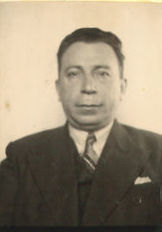 Enciclopedia Chilena. Carlos Morales San Martín [fotografía].